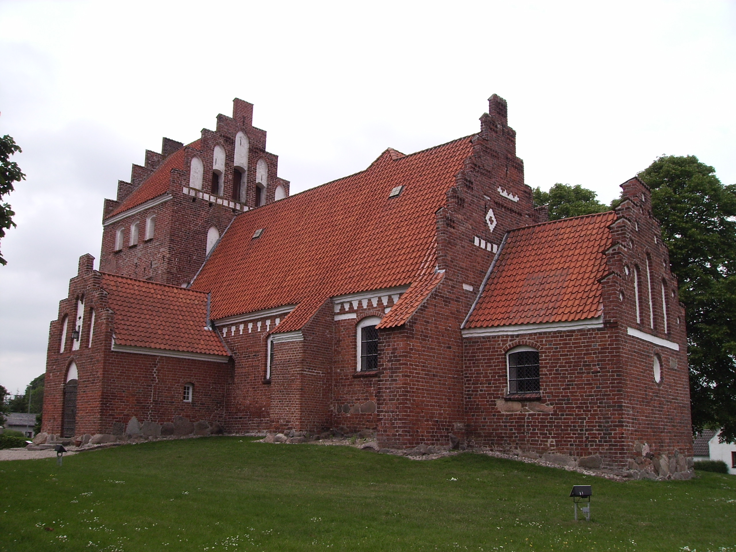 Rønninge Kirke, Rønninge Sogn, Åsum Herred, Odense Amt, Denmark (Danish Church) - Rønninge Kirke fra sydøst